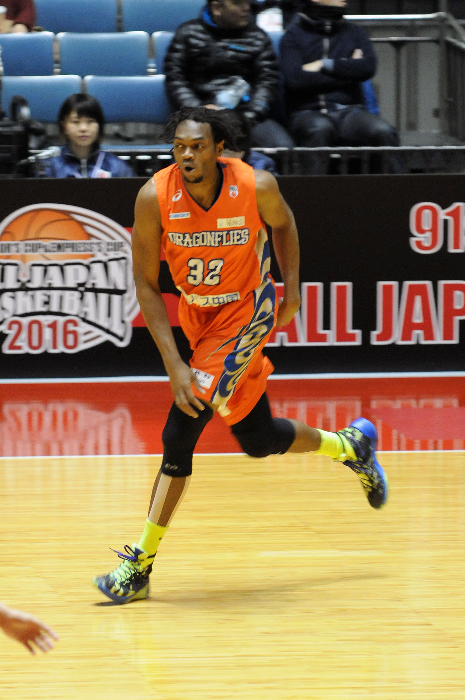 広島ドラゴンフライズ、ニカ・ウィリアムズ選手。代々木第一体育館で。